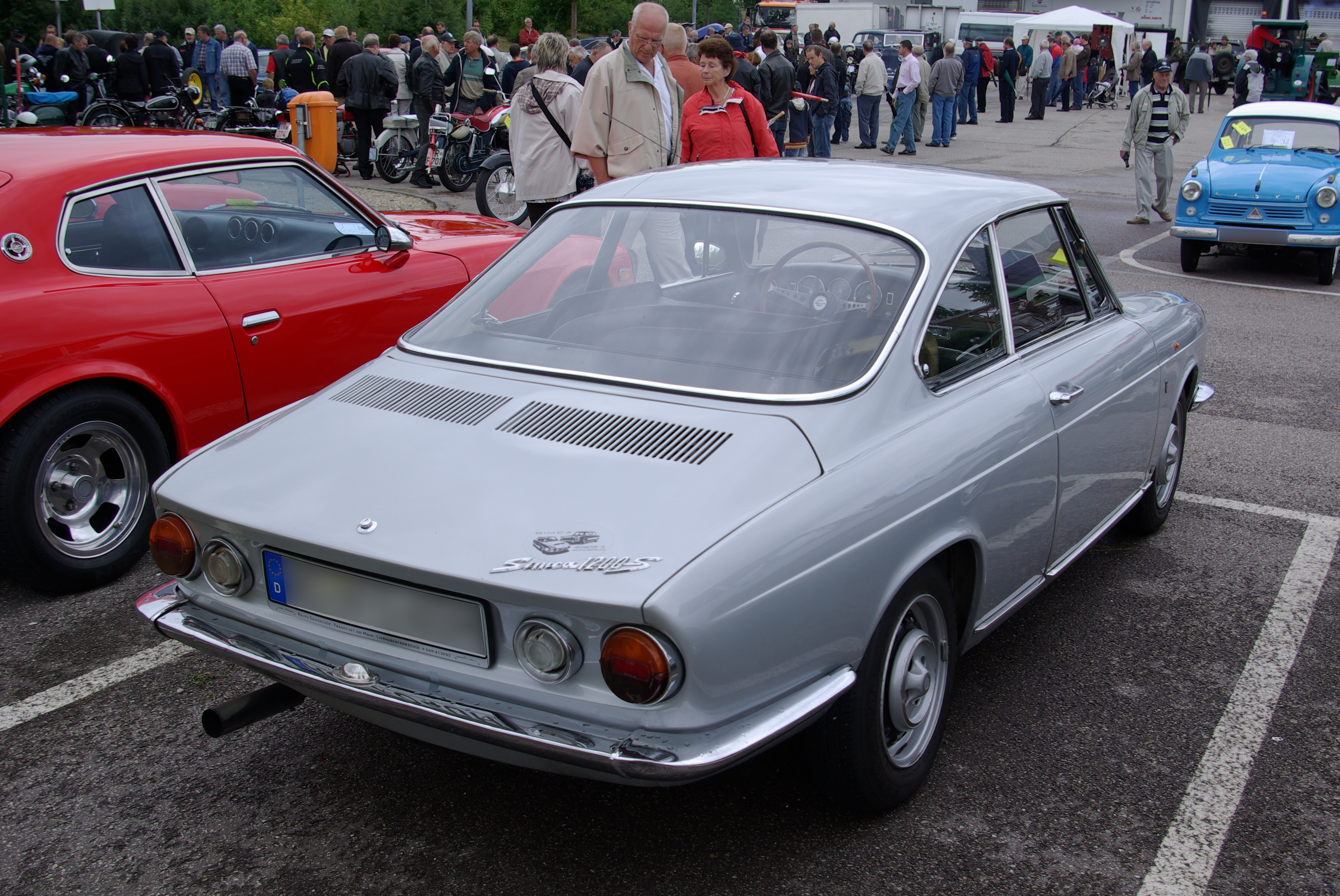 Simca 1200s Coupe, Baujahr 1968, Leistung 80 PS